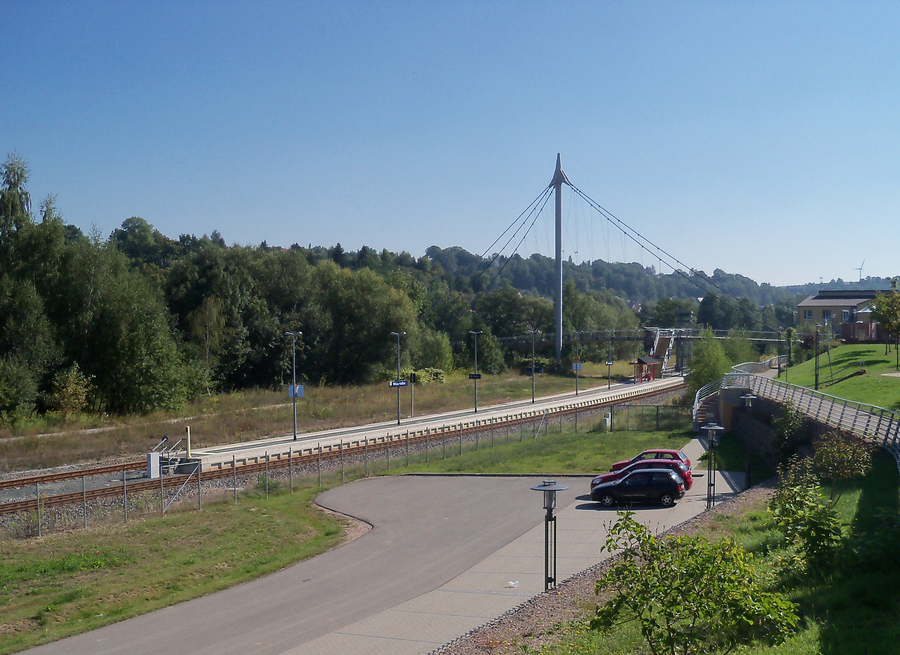 der 2007 errichtete Haltepunkt am Bahnhof Wilkau-Haßlau